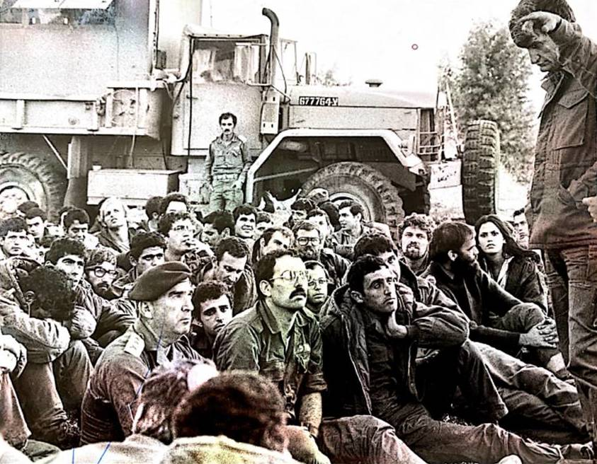 יאנוש בן גל בתחקיר אחרי מבצע בלבנון, 1980. יושבים הרמטכ"ל רפאל איתן ושני מימין משה סלעי